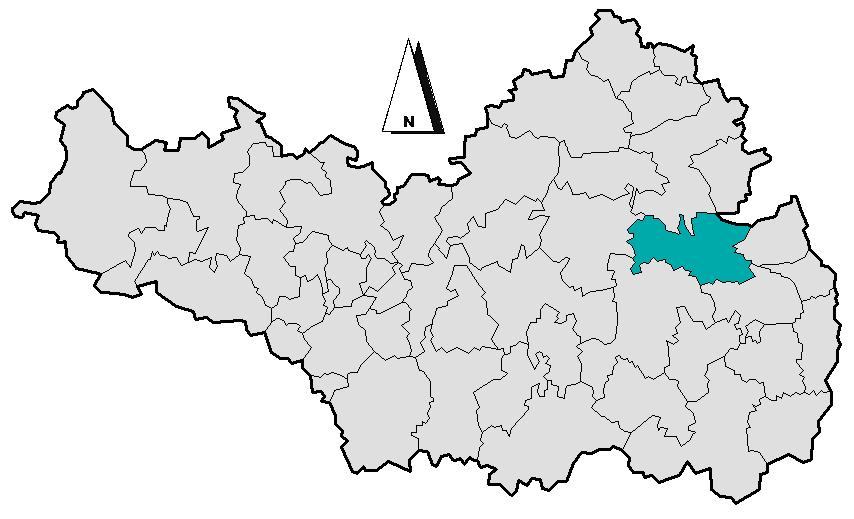 Maßstabsgetreues Schema der Lage der Gemeinde Gutenzell-Hürbel im Landkreis Biberach.